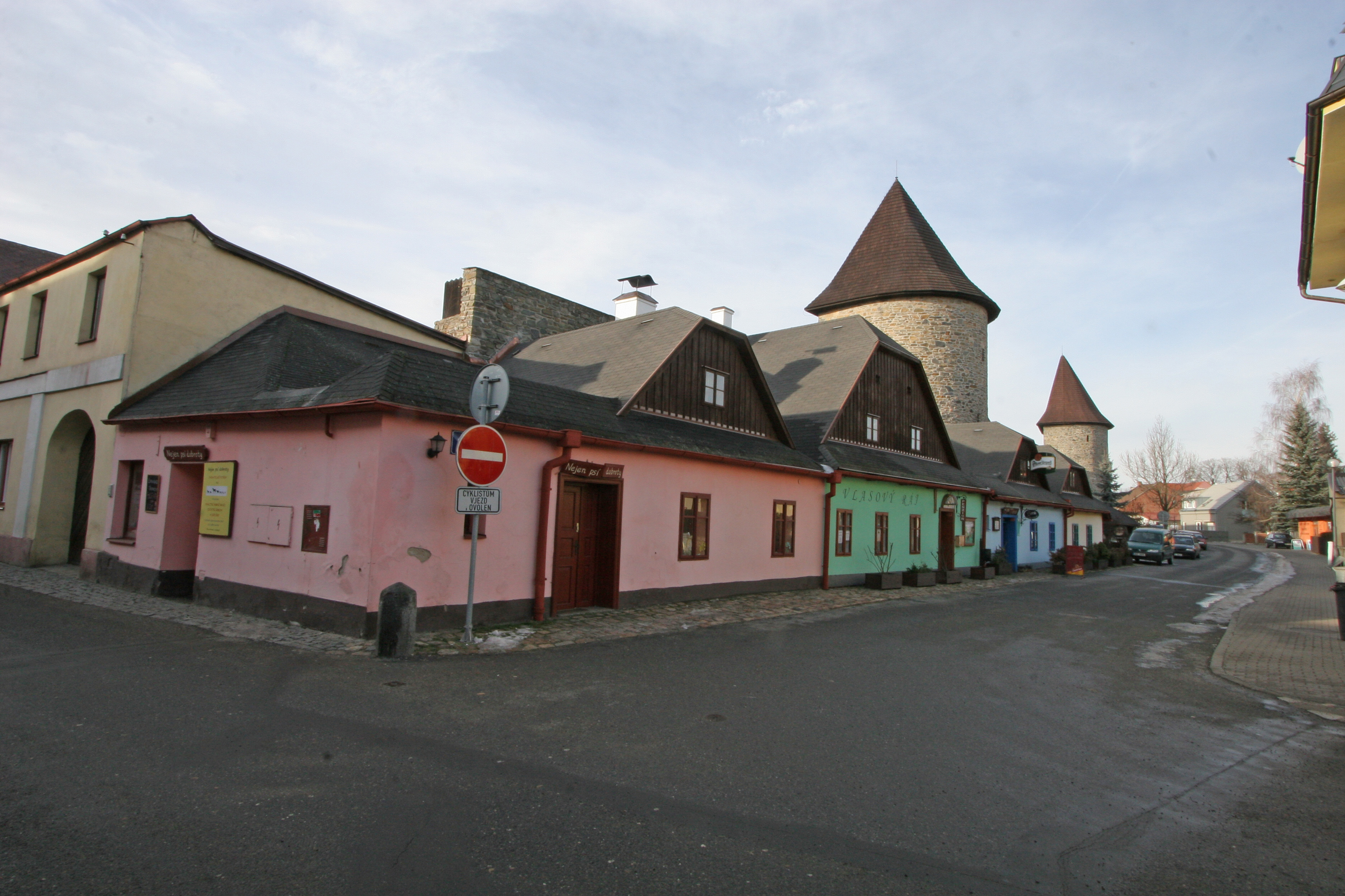 Předměstský dům (Polička), Polička 15